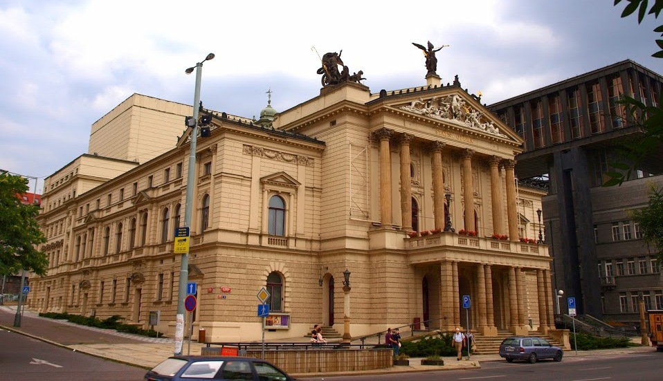 Státní opera Praha